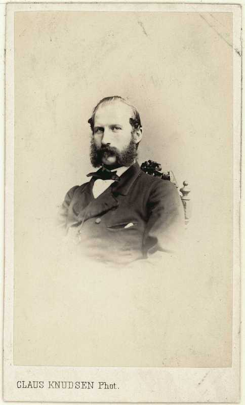 Otto Gjerdrum, portrett, mann, hoffjegermester, vignettert brystbilde.